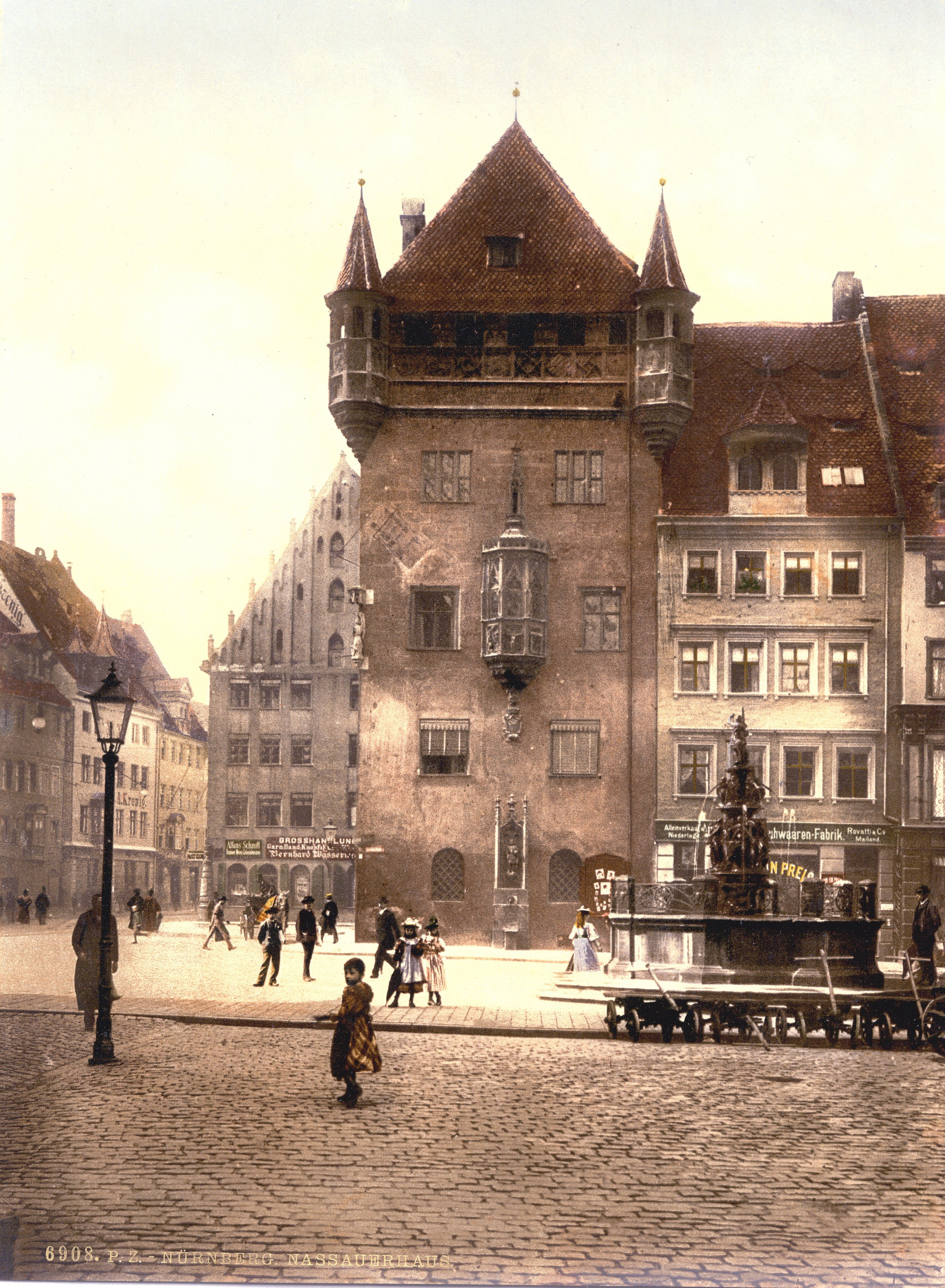 Nassauer Haus